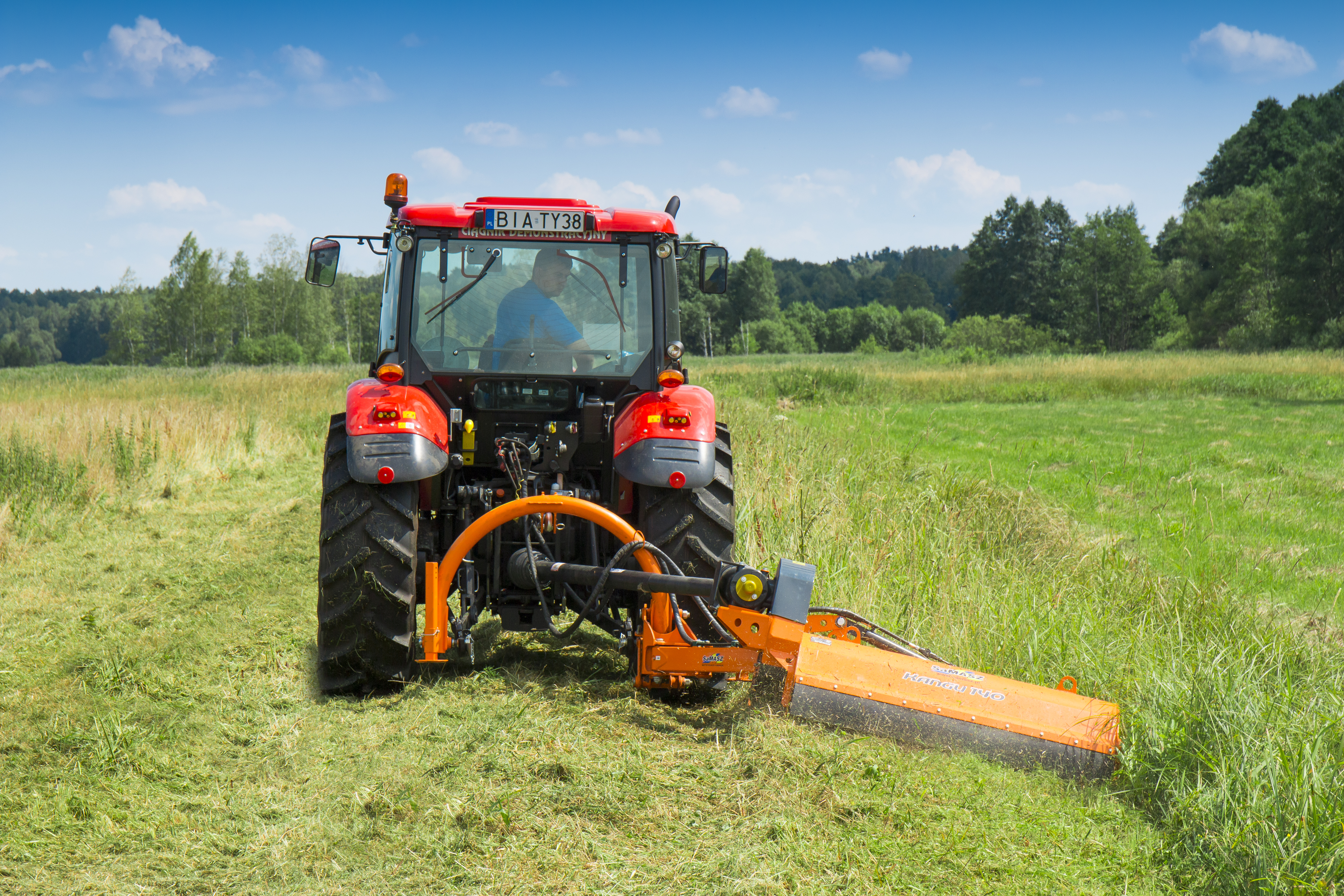 Kosiarka bijakowa SaMASZ Kangu 140 o szerokości roboczej 1,4m